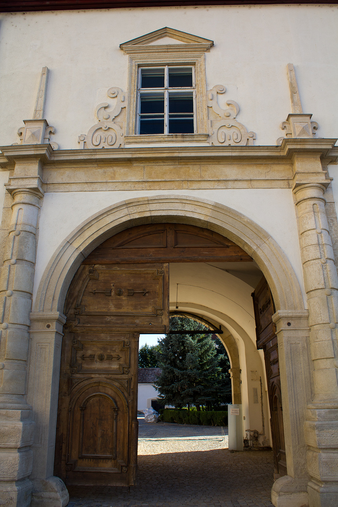 Palatul Episcopiei romano-catolice, azi sediul Arhiescopiei romano-catolice, Alba Iulia 01